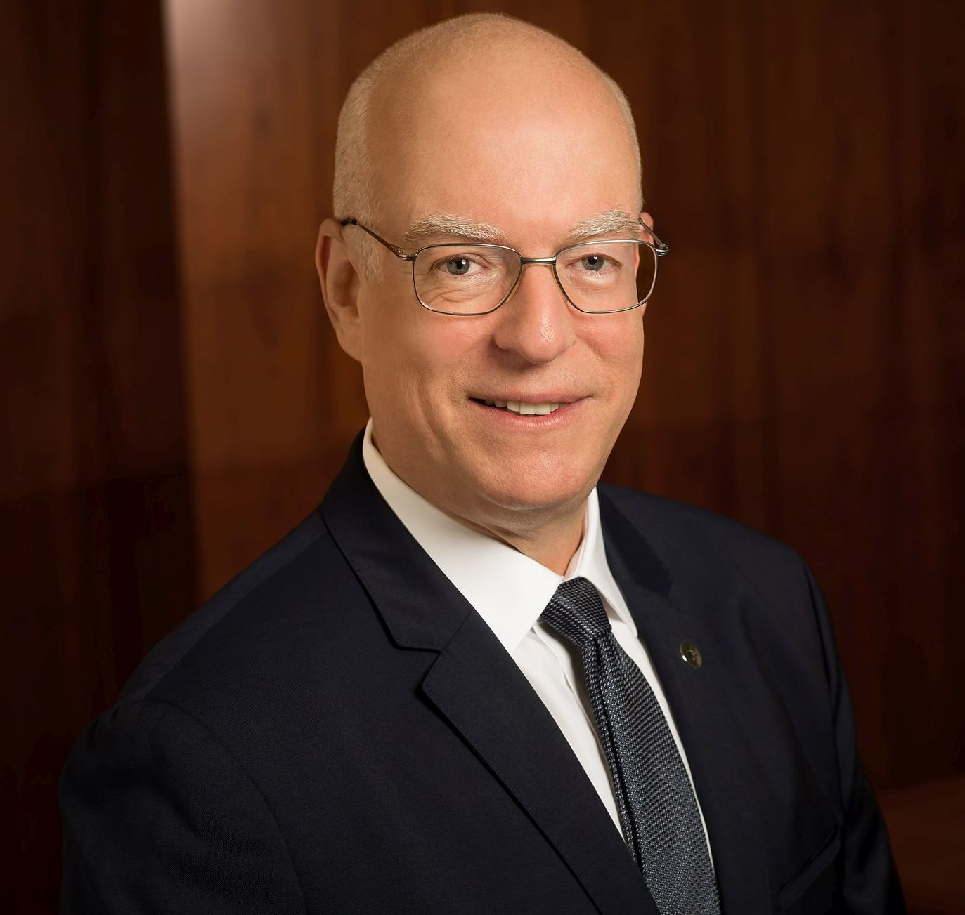 פרופ' אריאל פורת